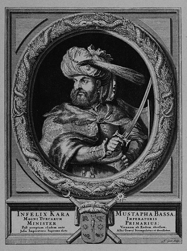 Großwesir Kara Mustafa Pascha